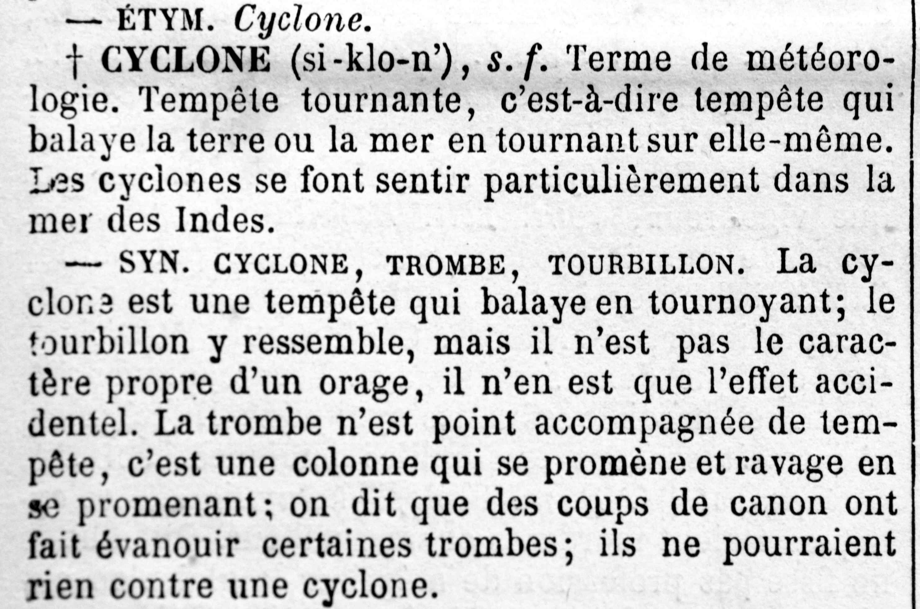 Dictionnaire de la langue française, plus connu comme le Littré - définition du mot cyclone à la page page 941 de la première partie du tome premier (A-C) de l'édition de 1863. Ce mot est féminin dans cette édition, cette erreur fut ensuite corrigée dans les éditions suivantes.